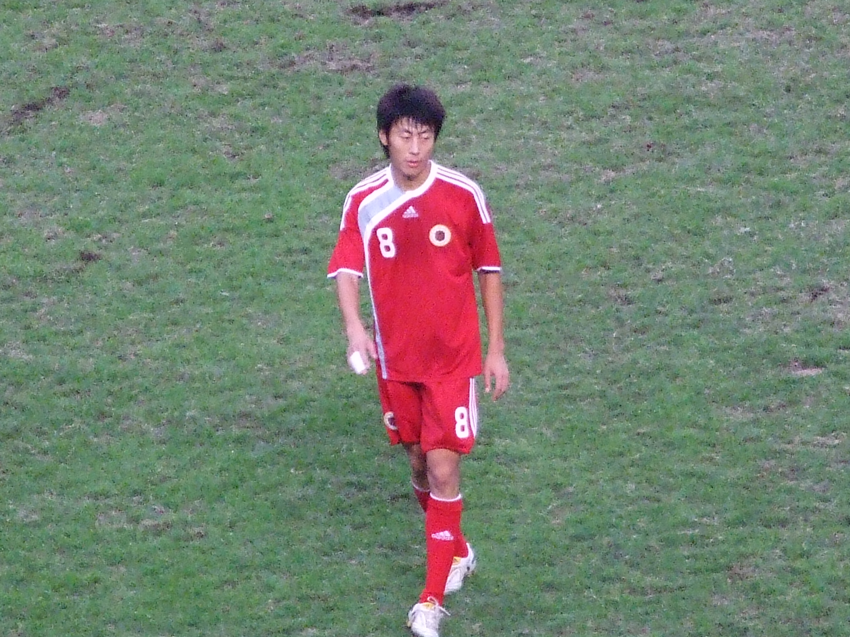 中文（香港）: 徐德帥